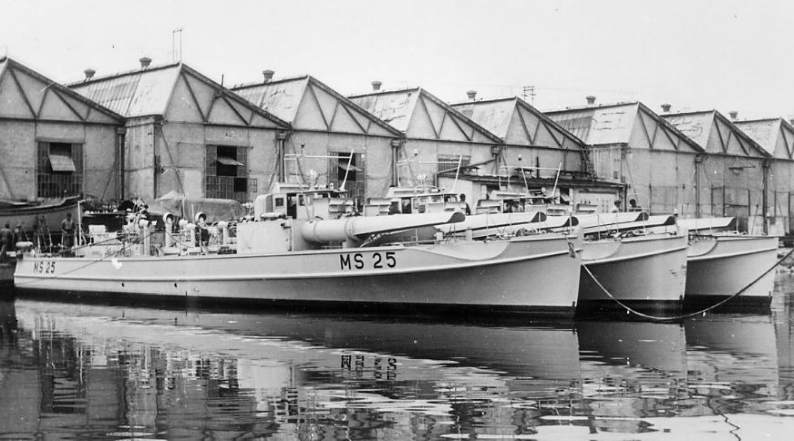 MAS 25 in cantiere